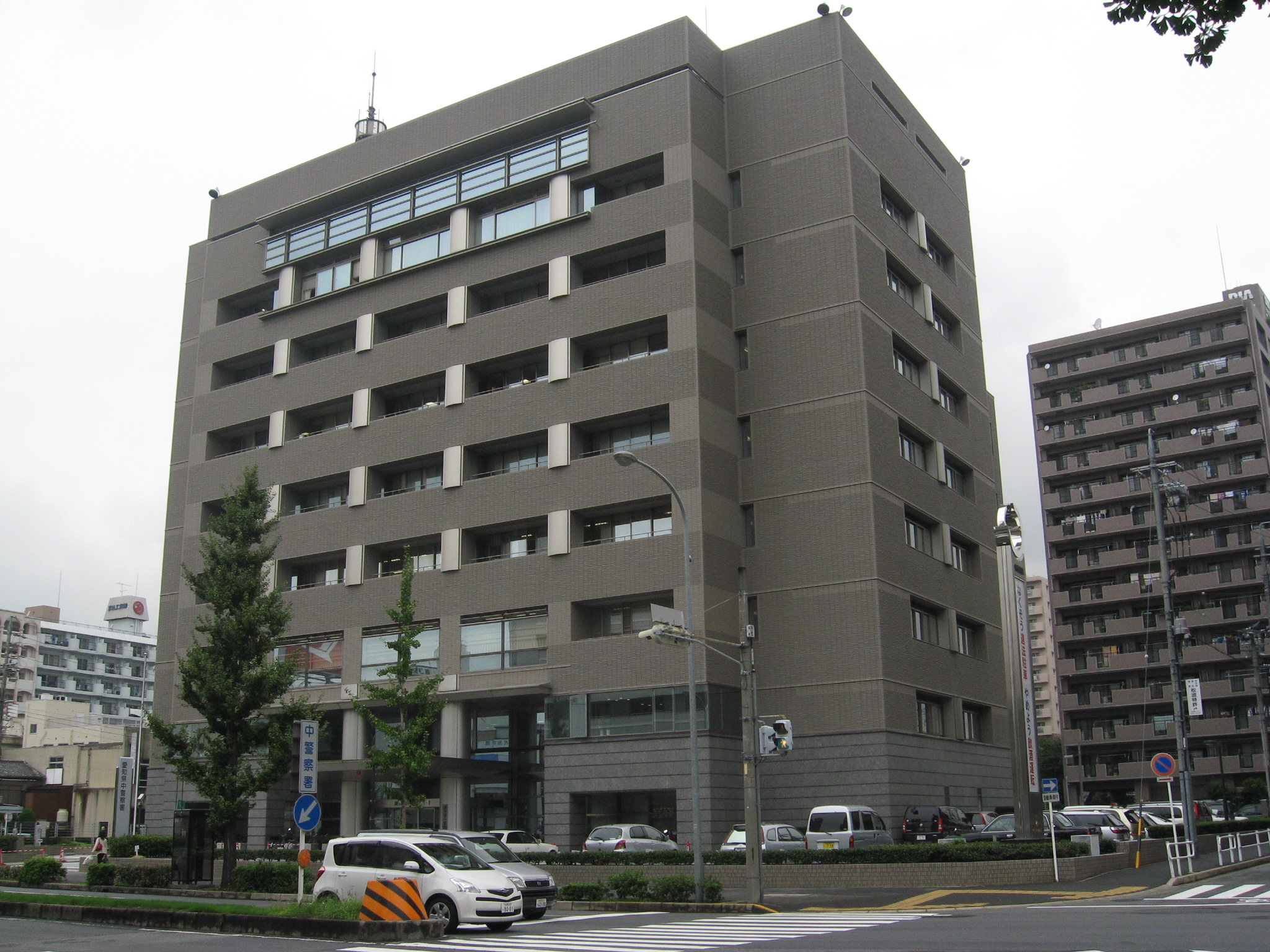 名古屋市中区千代田の愛知県警察中警察署 (Naka Police Station in Nagoya, Japan)